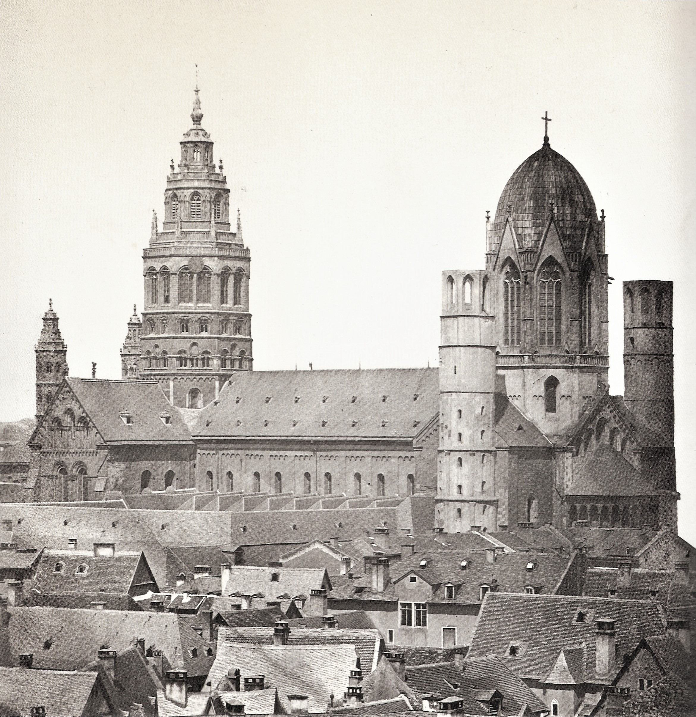 Mainzer Dom von Südosten (Salzpapier 20,3 x 19,2 cm). Diese Fotografie erschien ursprünglich 1858 in Emdens Buch Der Dom zu Mainz und seine bedeutensten Denkmäler in 36 Original-Photographien. Das Buch war eines der ersten photografischen Architekturmonografien in Deutschland und findet sich heute im Landesmuseum Mainz.